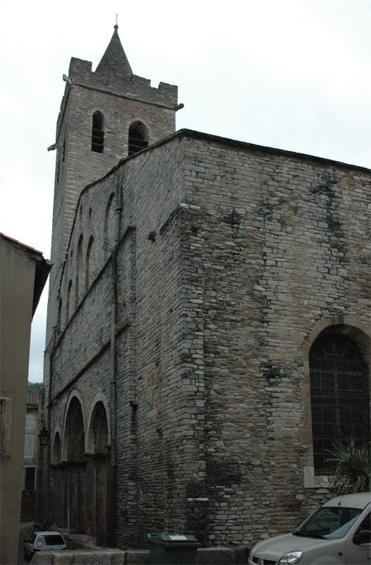 Antiga façana de l’església de l’abadia de Sant Ponç de Tomeres, França